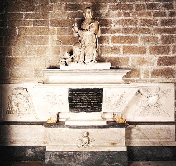 Tombeau de Monseigneur de Bertin (évêque de Vannes de 1745 à 1774) en la cathédrale Saint-Pierre de Vannes.